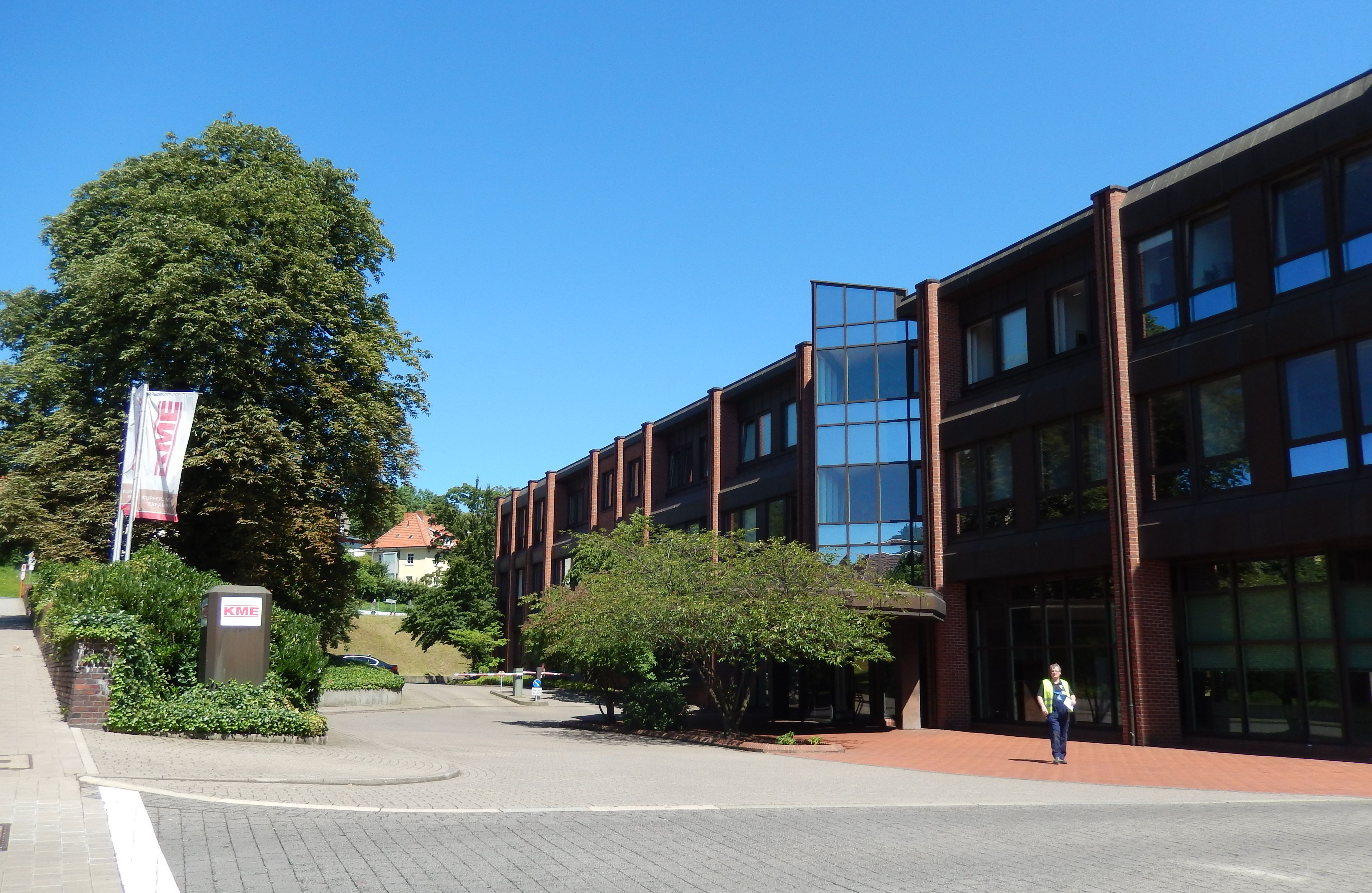 KME Osnabrück Verwaltung